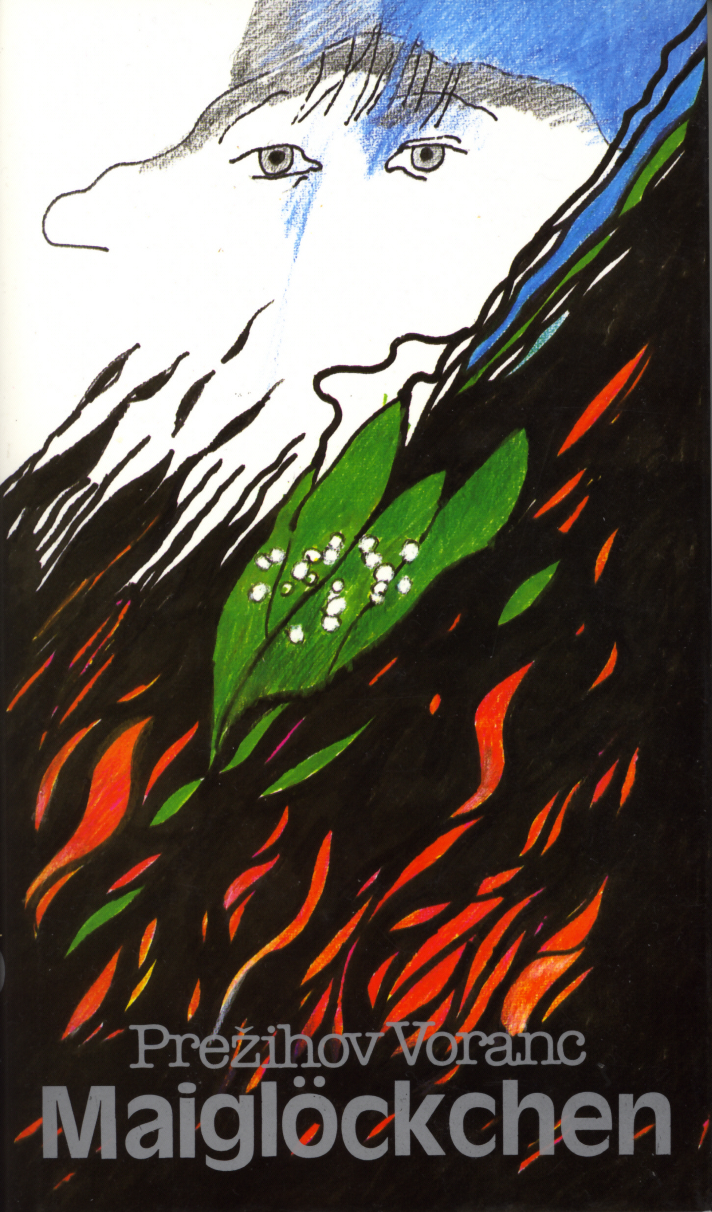 Prezihov Voranc, Maiglöckchen. Deutsche Ausgabe. Klagenfurt: Drava Verlag, 1985 Umschlaggestaltung: Matjaz Vipotnik (eigener Scan)